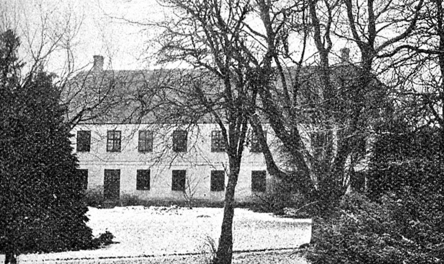 Langkildegård er en gammel gård, som nævnes første gang i 1497. Gården ligger i Lunde Sogn, Sunds Herred, Svendborg Amt, Egebjerg Kommune. Hovedbygningen er opført i 1844